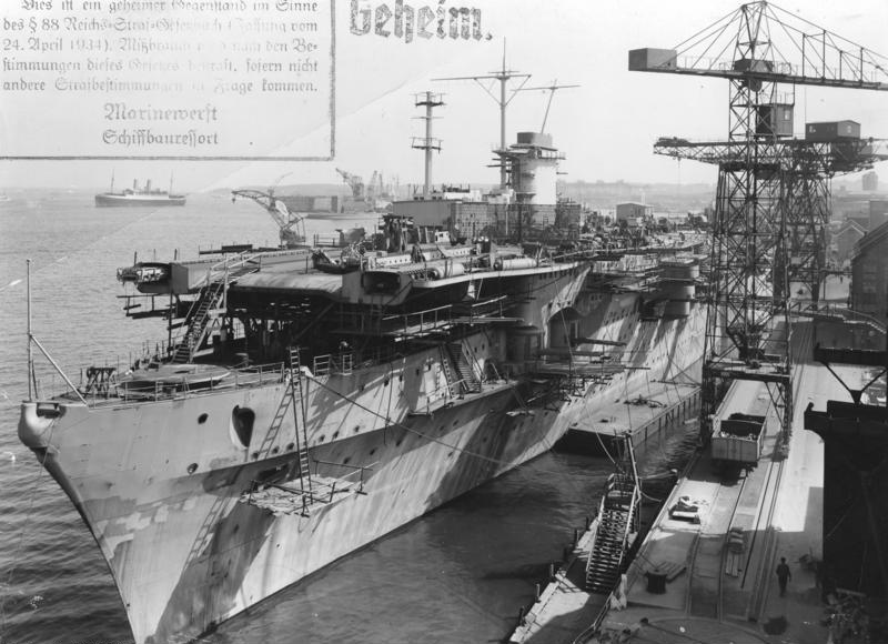 Neubau Nr. K 252. Bauzustand Aufgen. am 21.6.1940